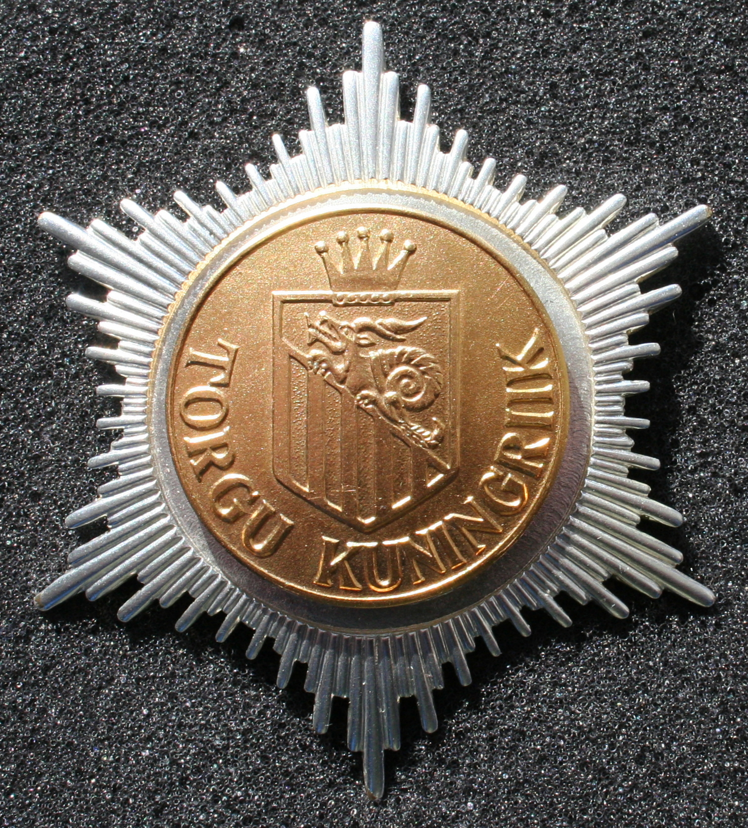 Torgu Kuningriigi ametimärk